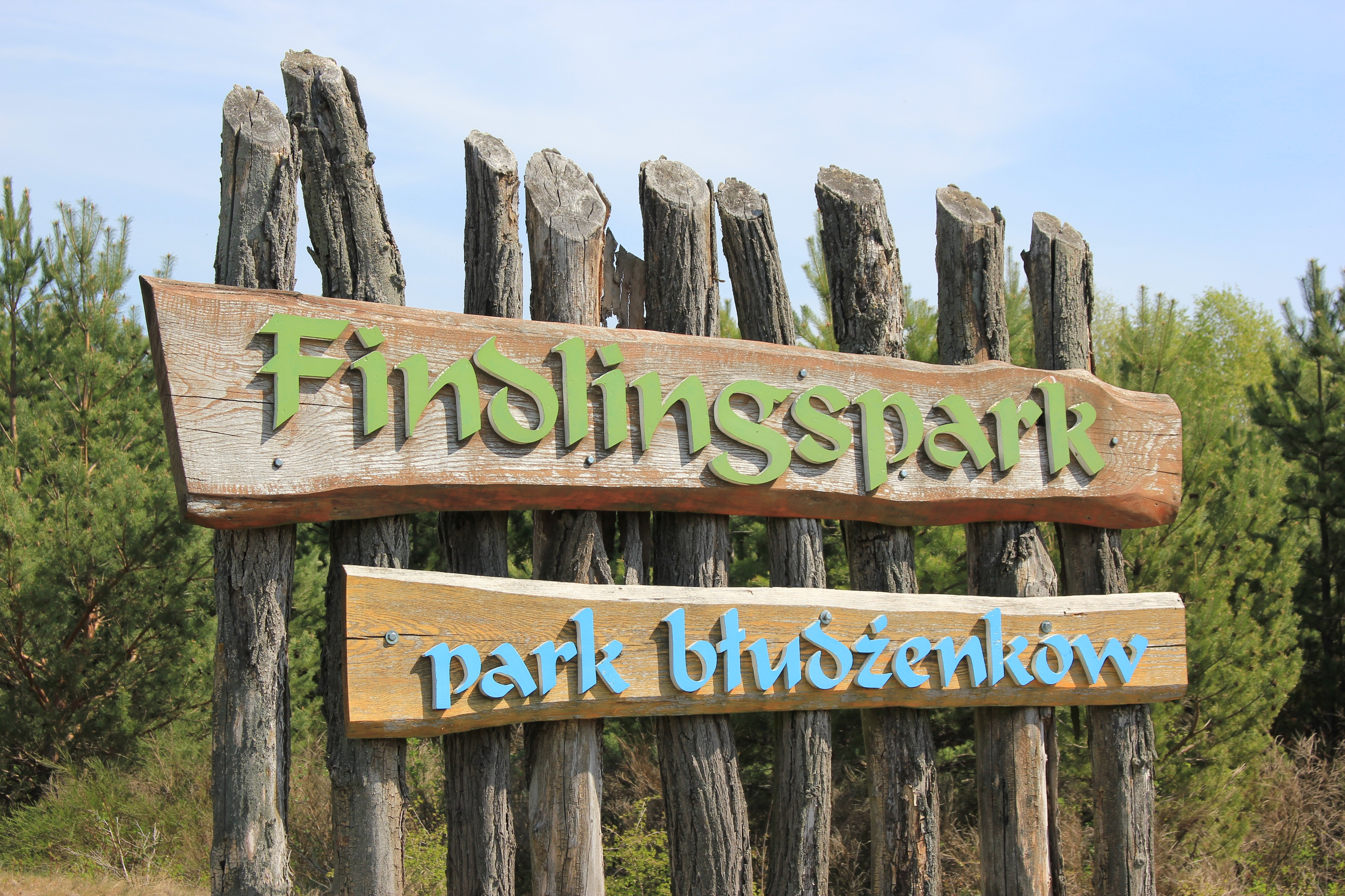 Hornjoserbsce: Powitanska tafla při zachodźe Wochožanskeho parka błudźenkow